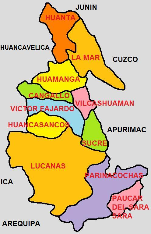 Imagen que muestra la División Politica del Departamento de Ayacucho, una de las 25 circunscripciones en que se divide el Perú